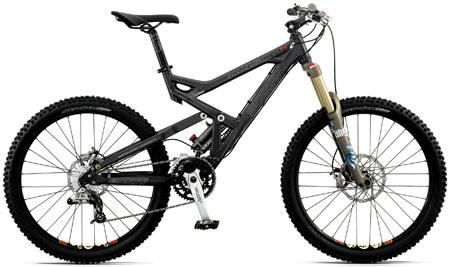 Scott Ransom